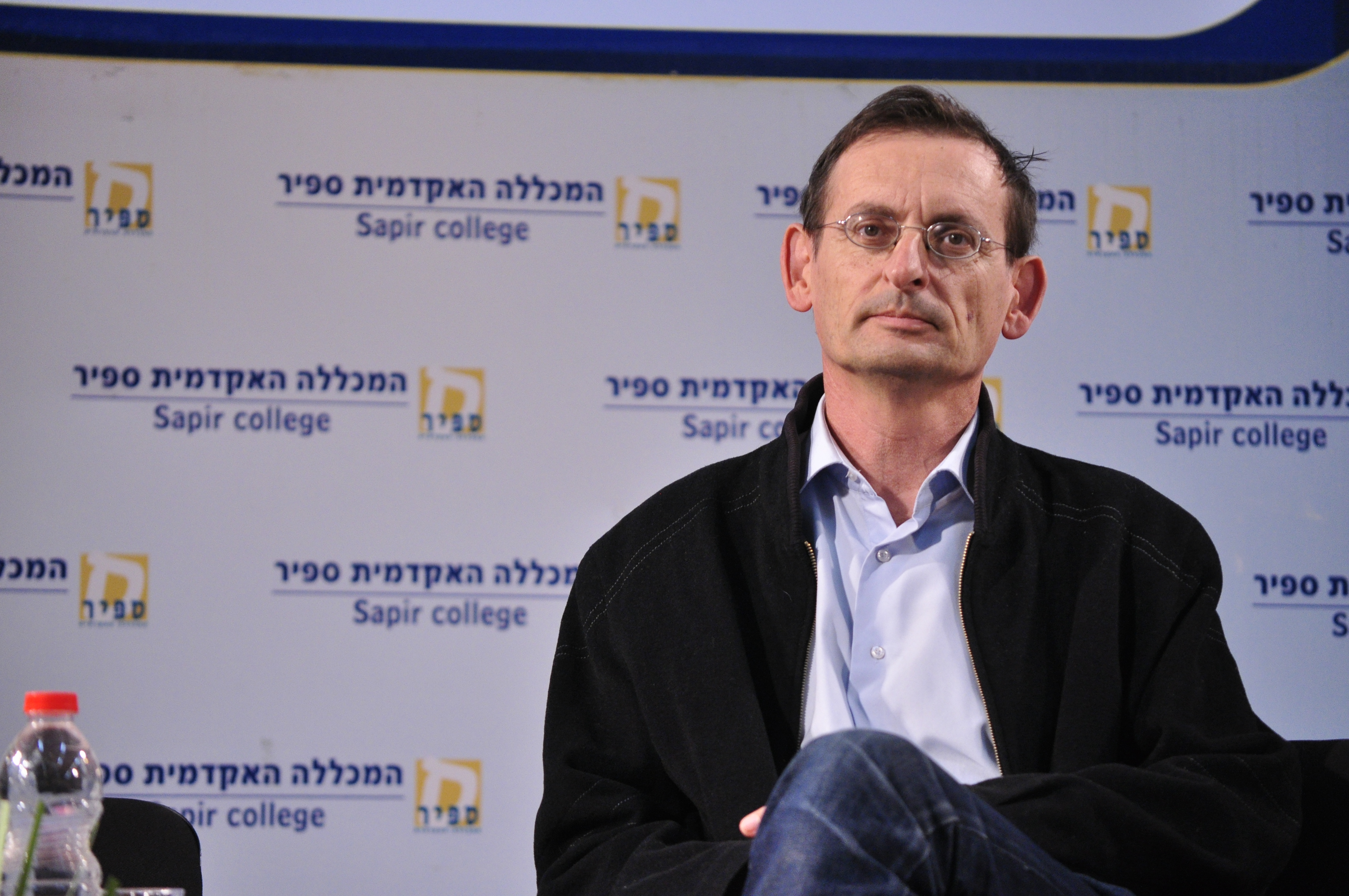 כנס שדרות לחברה במכללה האקדמית ספיר ובעיר שדרות 2015